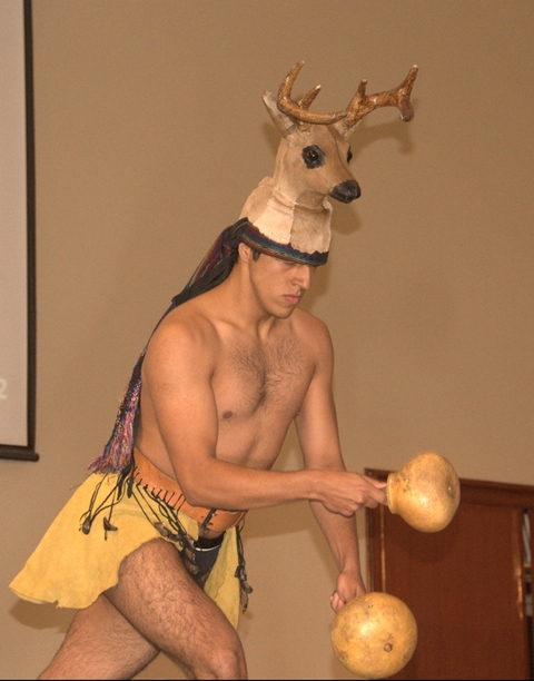 baile de venado interpretado por la Compañia de Danza Folklórica de ITESM Campus Ciudad de Mexico en Campus Ciudad de México